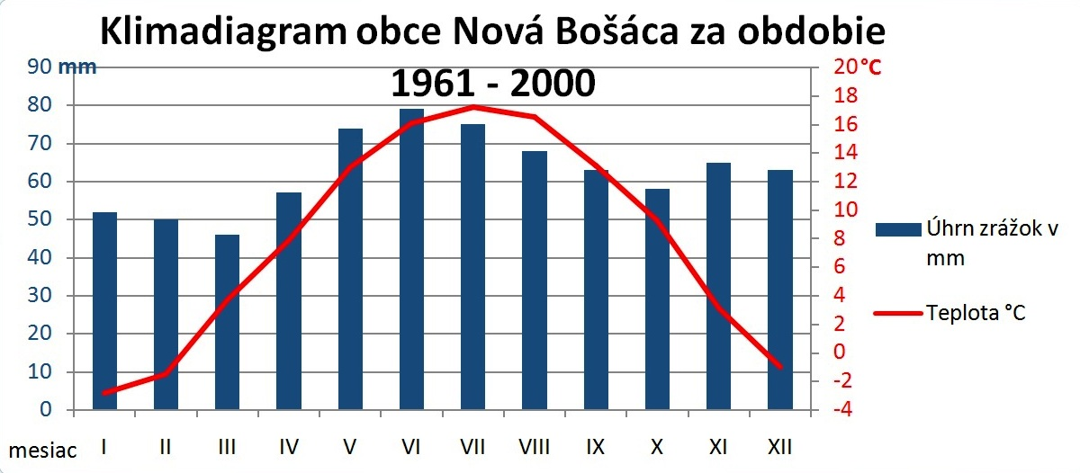 Klimadiagram obce Nová Bošáca za obdobie 1961 - 2000